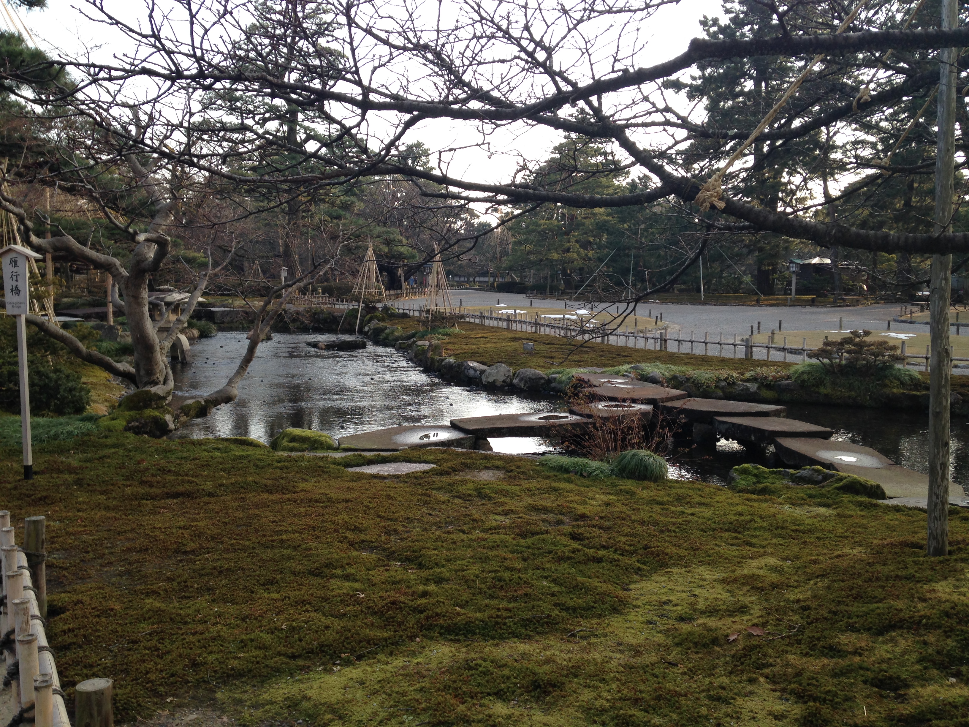 兼六園・雁行橋